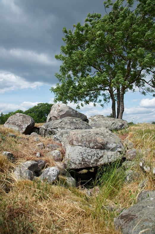 Resmo 85:1. Gånggrift i hög. Motiv: Resmo 85:1 Nyckelord: Riksintressen, Världsarv Kategori: Stenkammargrav Resmo 85:1. Gånggrift i hög. Resmo 85:1.